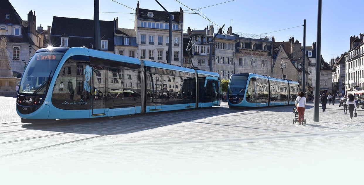 Deux rames du tramway de Besançon, place de la Révolution.